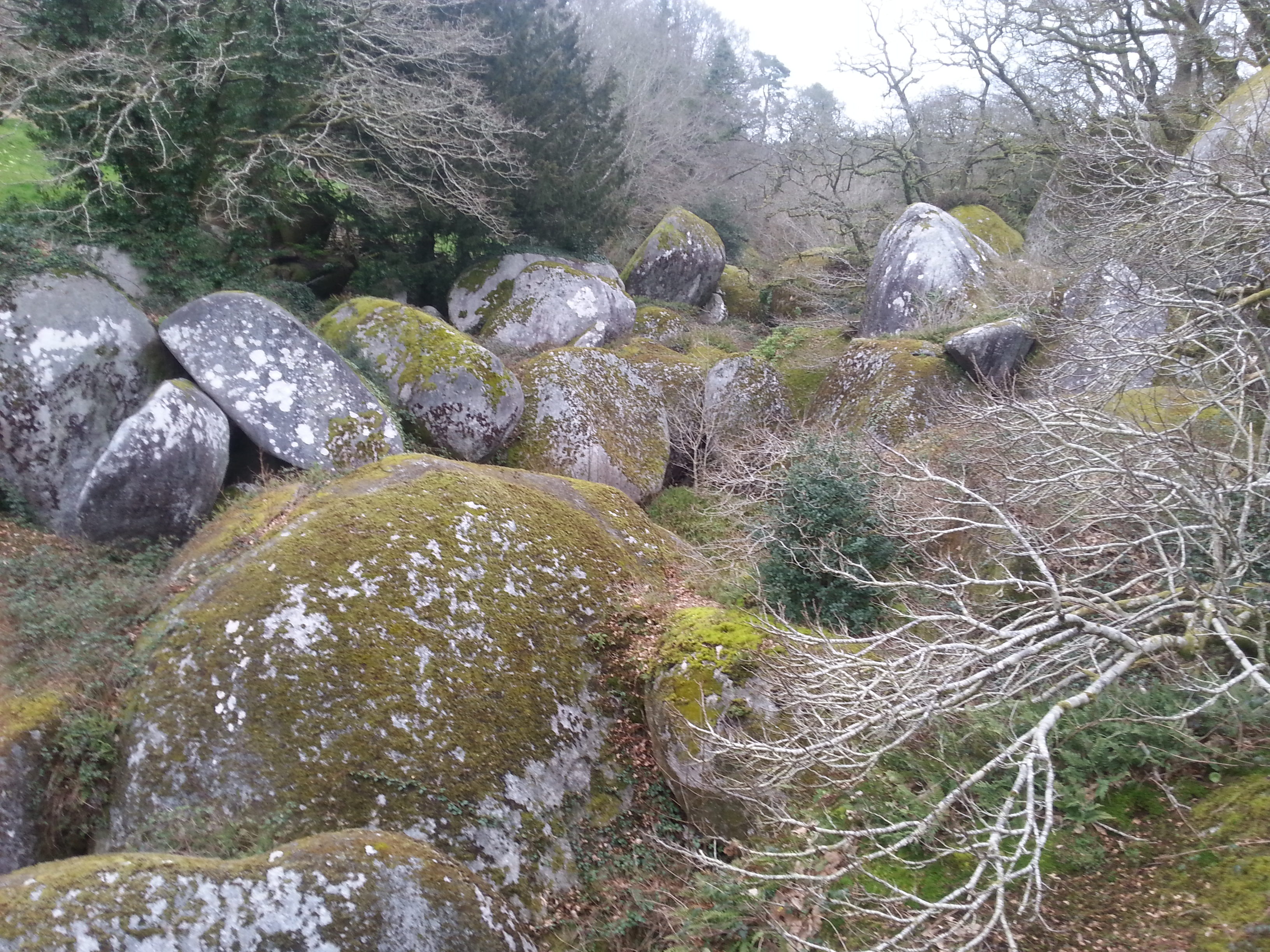 Huelgoat